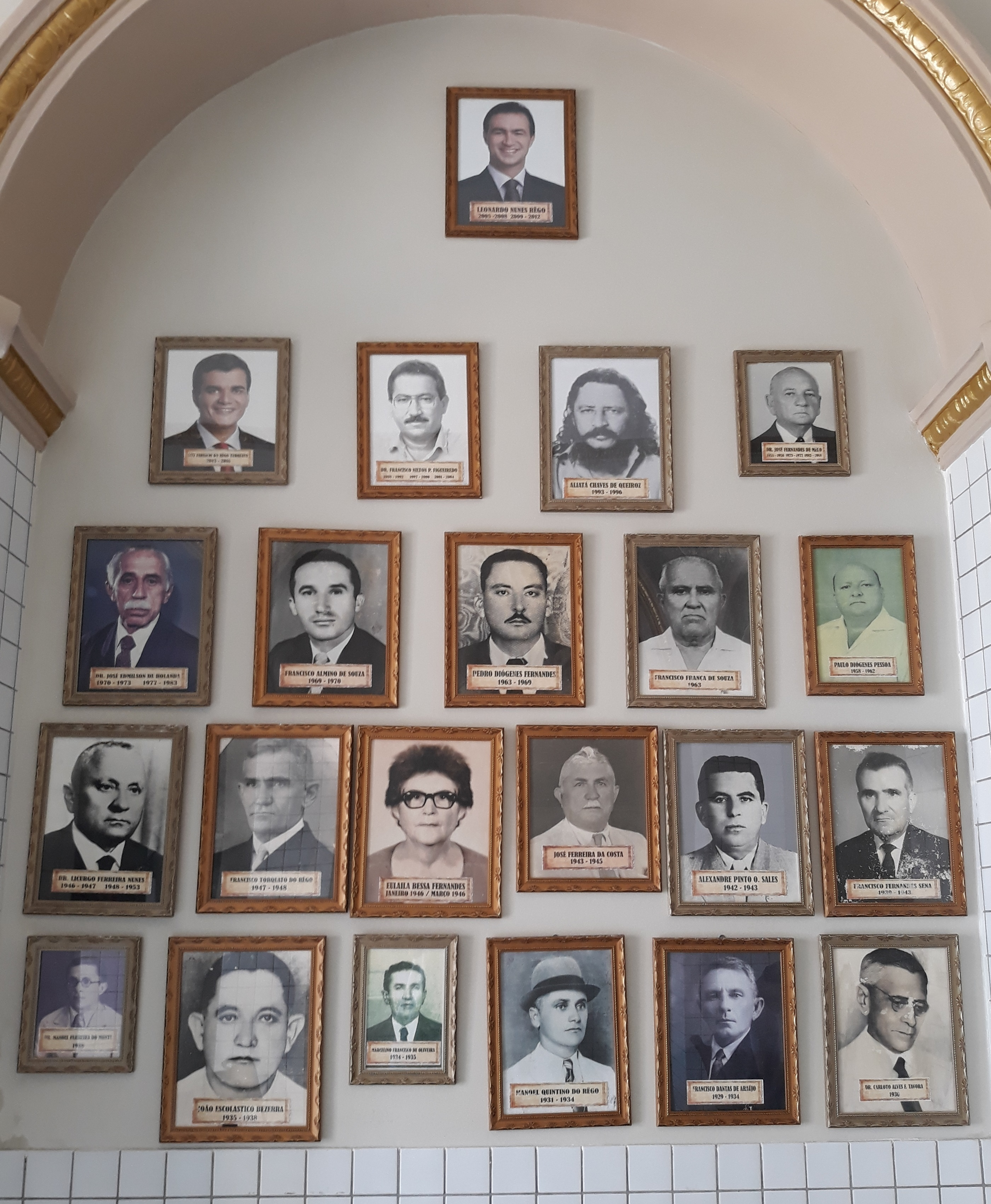 Galeria de prefeitos municipais de Pau dos Ferros, Rio Grande do Norte (Brasil), exposta na sede da prefeitura.